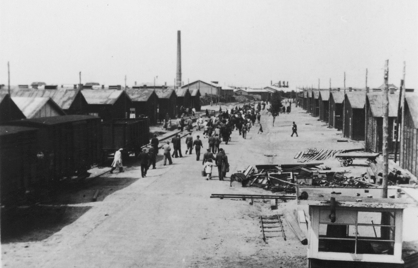 De ‘Boulevard des Misères’, zoals de hoofdweg door de kampgevangenen werd genoemd. Langs deze weg lag de spoorlijn en vertrokken in de Tweede Wereldoorlog de treinen naar de vernietigingskampen in het oosten.